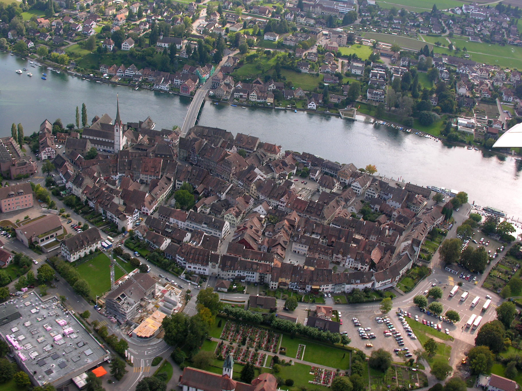 Switzerland, Canton of Schaffhausen, Aerial view of Stein am Rhein